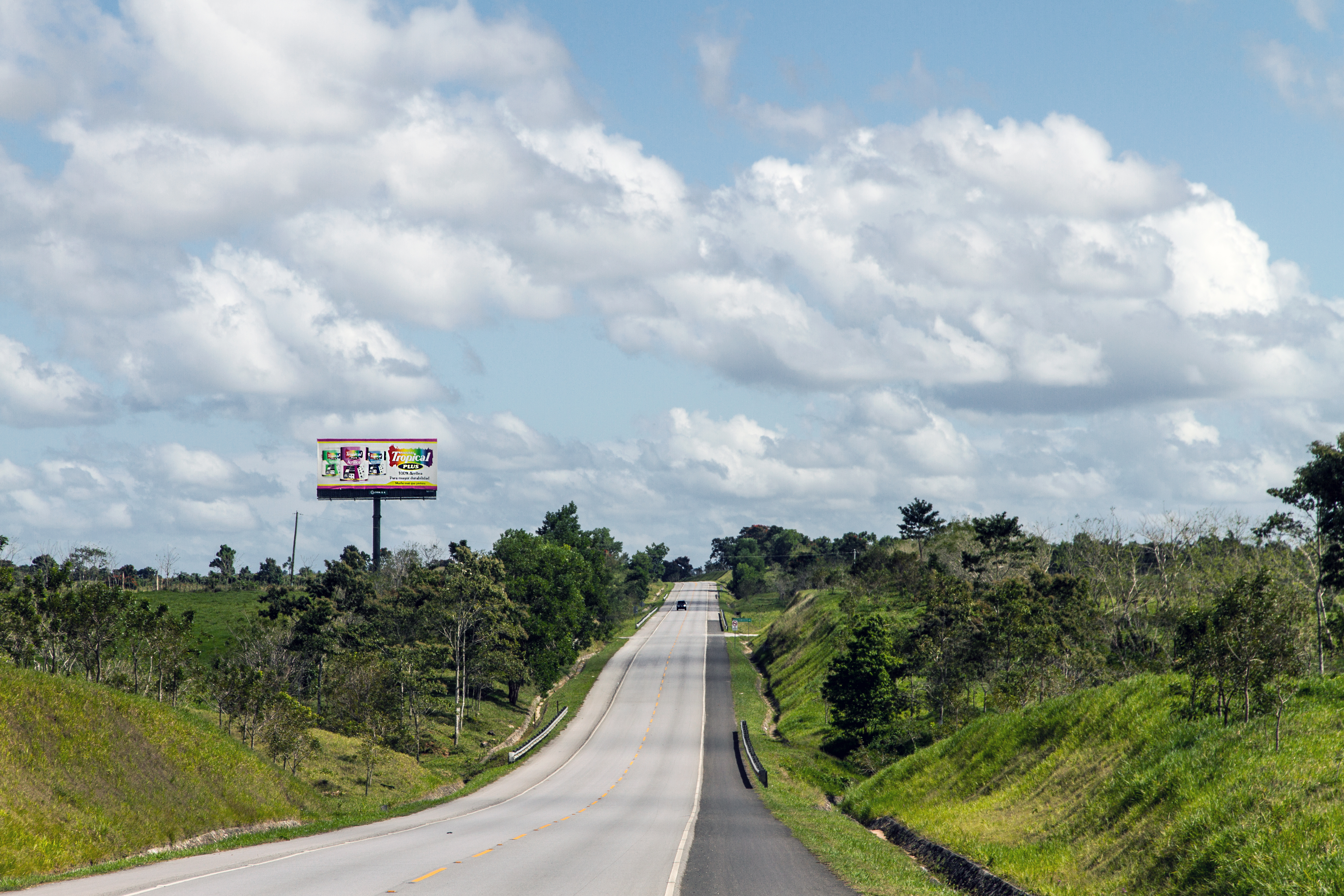 autopista del nordeste